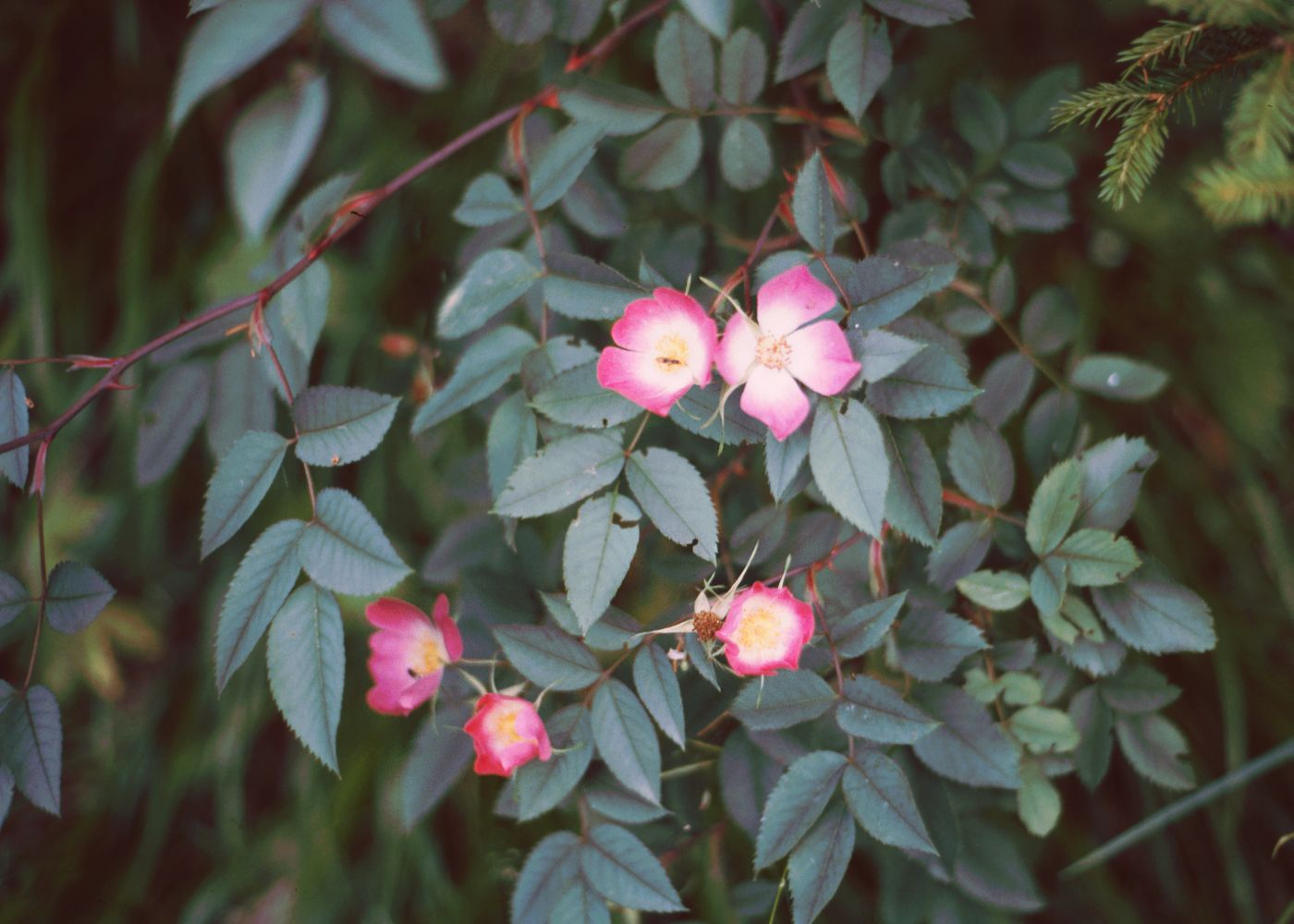 Rotblatt-Rose (Rosa glauca Pourr.), Rosengewächse (Rosaceae) - Österreich/Austria/Autriche: Kärnten/Carinthia, Karawanken, bei Zell Pfarre/Sele Fara